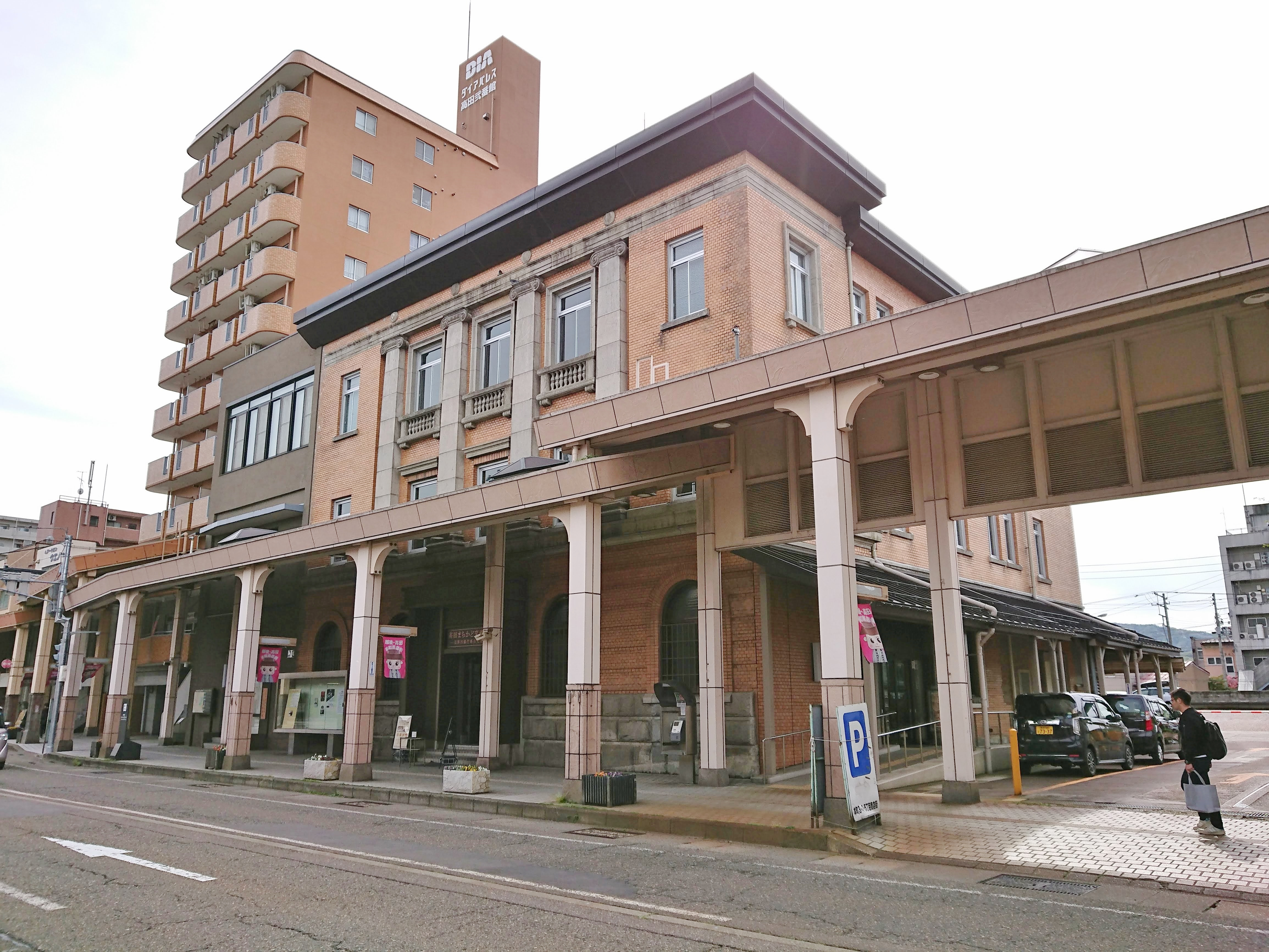 第四銀行（旧）高田支店の店舗外観